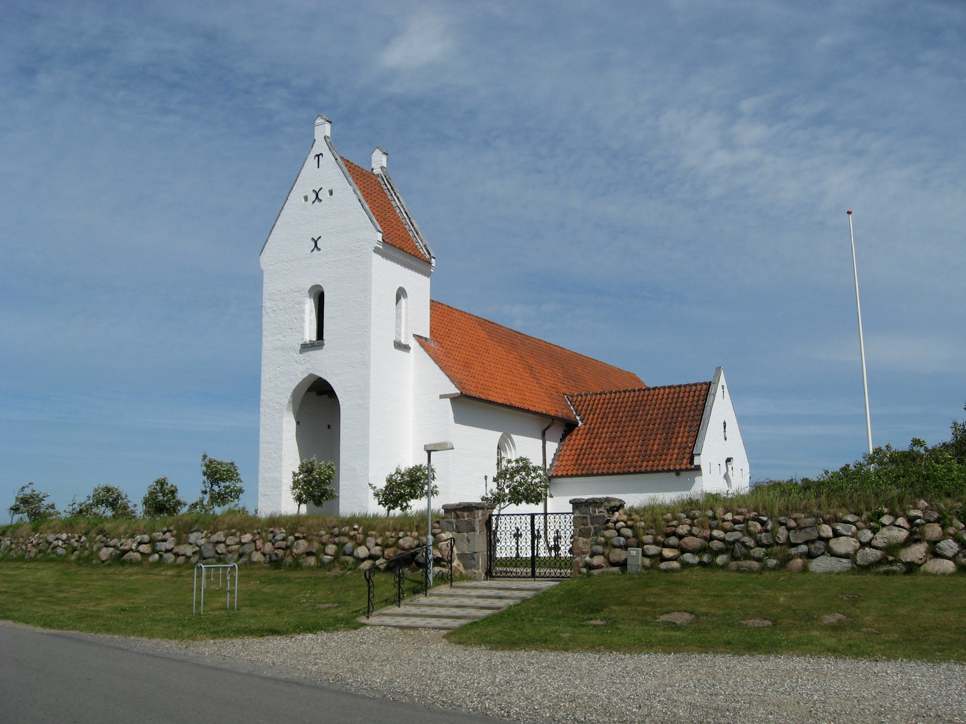 Alstrup kirke, Jammerbugt provsti